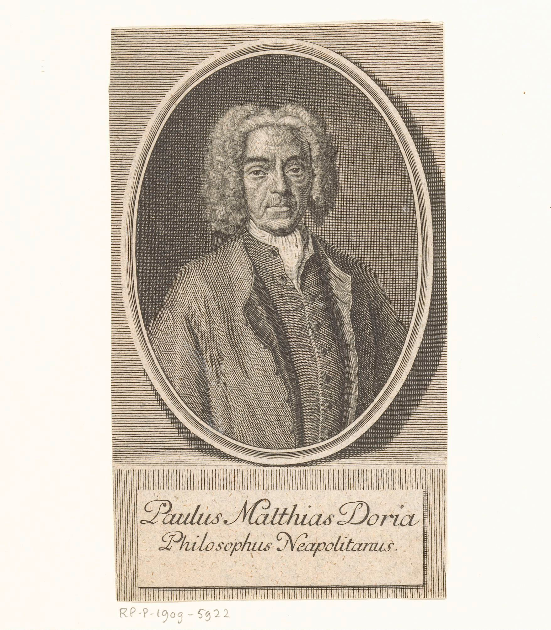 IdentificatieTitel(s): Portret van Paolo Mattia DoriaObjecttype: prent Objectnummer: RP-P-1909-5922Catalogusreferentie: HAB A 5097Opschriften / Merken: verzamelaarsmerk, verso, gestempeld: Lugt 2228VervaardigingVervaardiger: prentmaker: Johann Martin BernigerothPlaats vervaardiging: LeipzigDatering: 1740Fysieke kenmerken: gravureMateriaal: papier Techniek: graveren (drukprocedé)Afmetingen: blad: h 145 mm (binnen de plaatrand afgesneden) × b 83 mm (binnen de plaatrand afgesneden)ToelichtingPrent ook gebruikt in: Zuverlässige Nachrichten von dem gegenwärtigen Zustande, Veränderung und Wachsthum der Wissenschaften. dl. 10. Leipzig: Johann Friedrich Gleditsch, 1740.OnderwerpWat: historical personsWie: Paolo Mattia DoriaVerwerving en rechtenVerwerving: aankoop 1905Copyright: Publiek domein